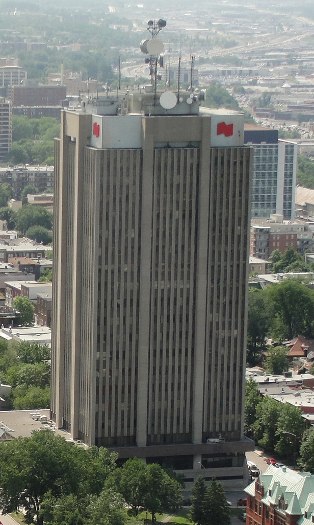 Place de la Capitale, à Québec.